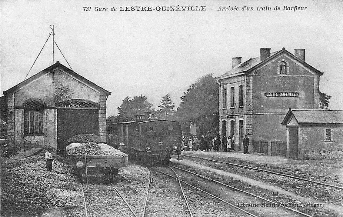 Intérieur de la gare de Lestre - Quinéville sur le chemin de fer de Valognes à Barfleur au début des années 1900.